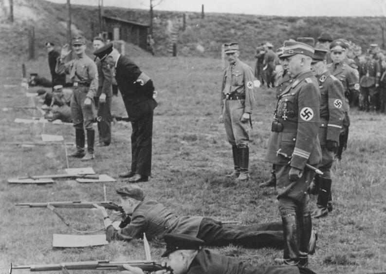 Wehrschiessen leistete Vorarbeit Der Inspekteur für die Schiessausbildung des deutschen Volkssturms, Stabschef der SA. Schepmann, überprüft beim Wehrschiessen des deutschen Volkes die Leistungen. Das Wehrschiessen hat Millionen deutscher Männer im Umgang mit der Waffe geübt. Damit ist eine wichtige Vorarbeit für die Ausbildung zum deutschen Volkssturm geleistet. Foto: Wegener/Transocean-Europapress A. 6932